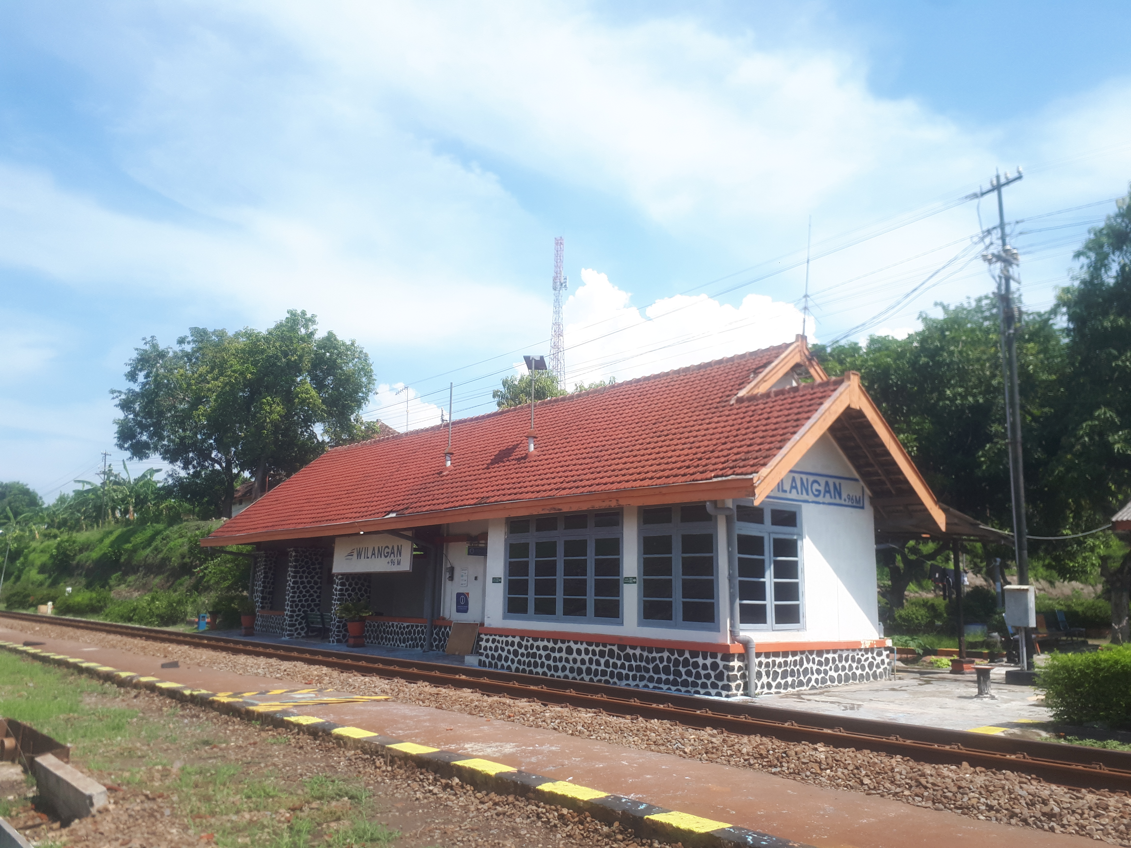 Stasiun Wilangan yang dinonaktifkan pada 30 April 2019 bersamaan dengan aktivasi rel jalur ganda Babadan - Nganjuk.